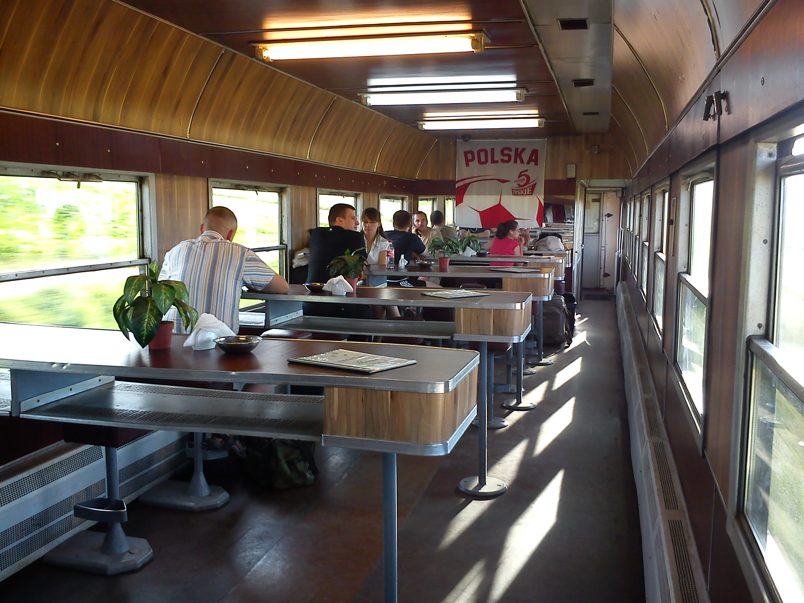 Wagon barowy w RegioExpressie z Warszawy do Poznania.